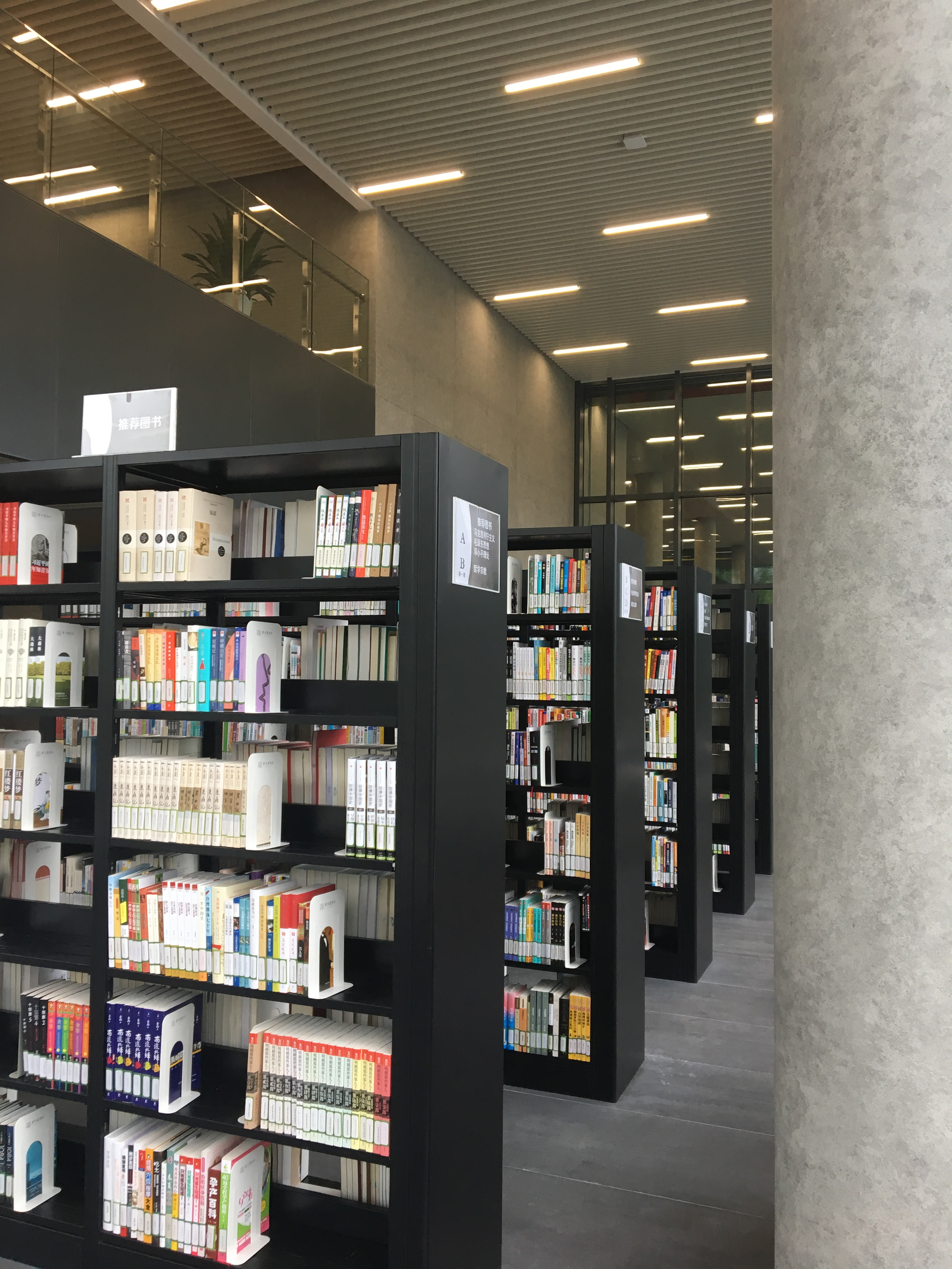 中文（中国大陆）: 宁波图书馆新馆阅览室